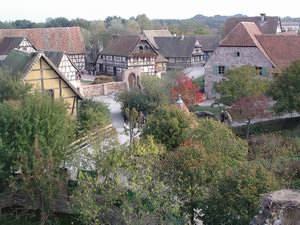 Écomusée d'Alsace à Ungersheim, Haut-Rhin, France Source: photo perso Rémi Stosskopf